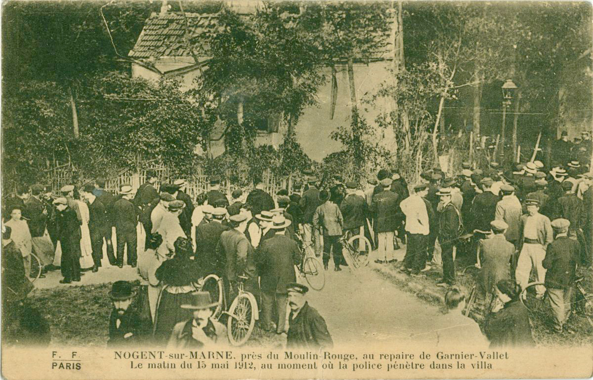 Cartão postal antigo com imagem do cerco aos anarquistas expropriadores Octave Garnier e René Valet em Nogent-sur-Marne, em 15 de maio de 1912.